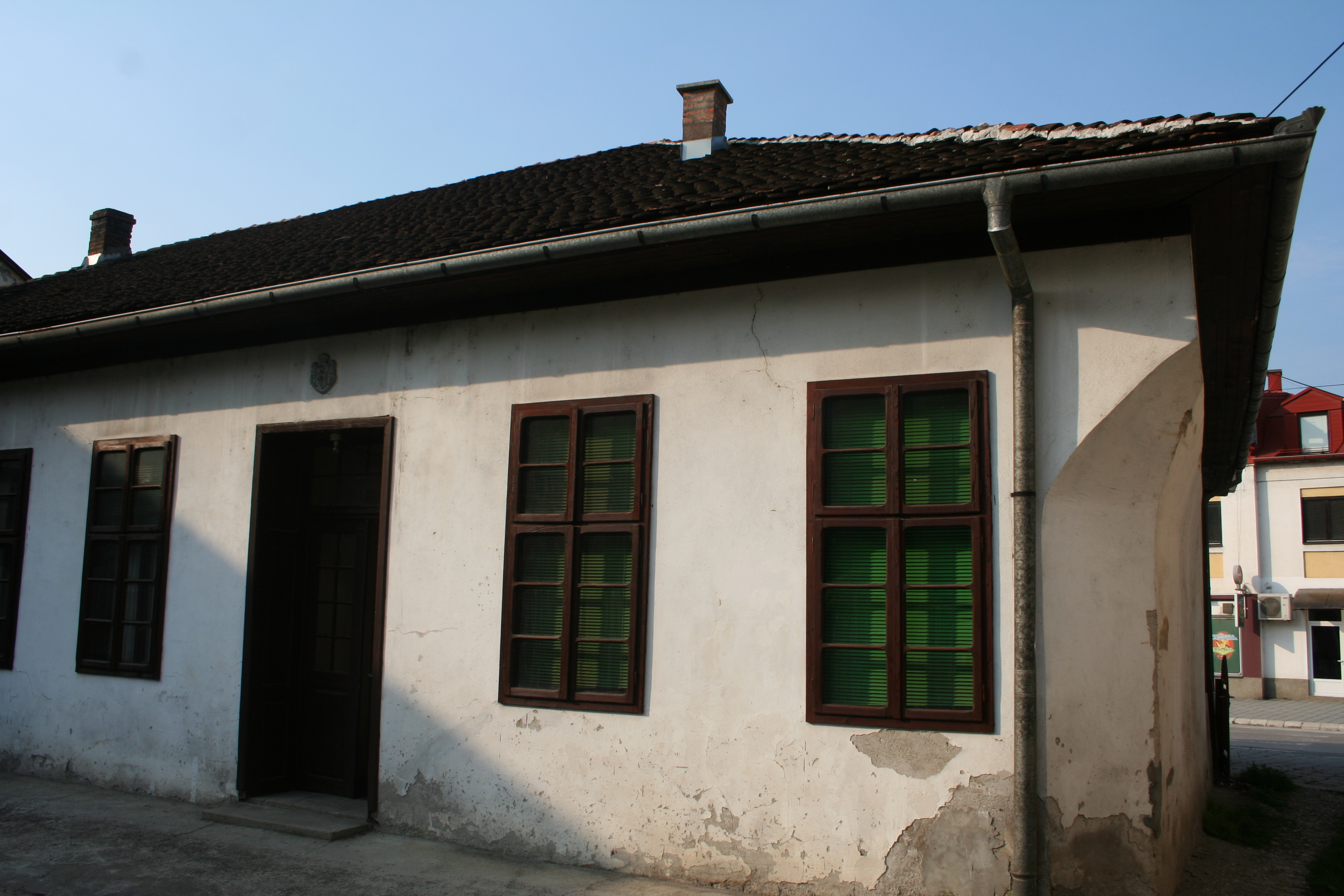 Vukajlovića mehana, Bajina Bašta